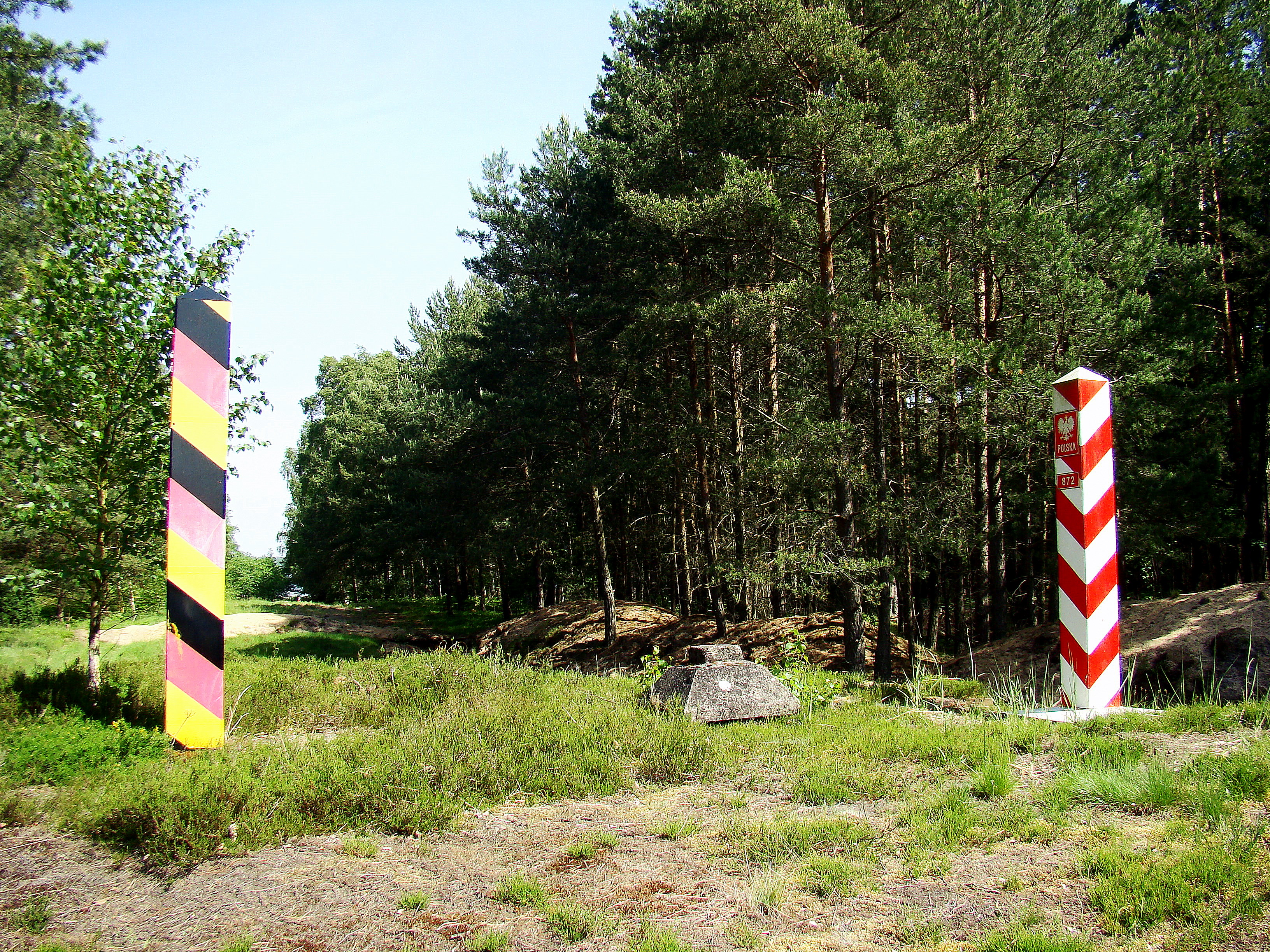 Granica państwowa polsko-niemiecka, znak graniczny nr. 872, okolice Myśliborza Wielkiego